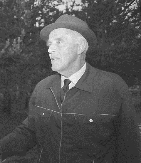 Tidligere statsminister Per Borten (1913–2005) i Folldal. Bildet er beskåret.